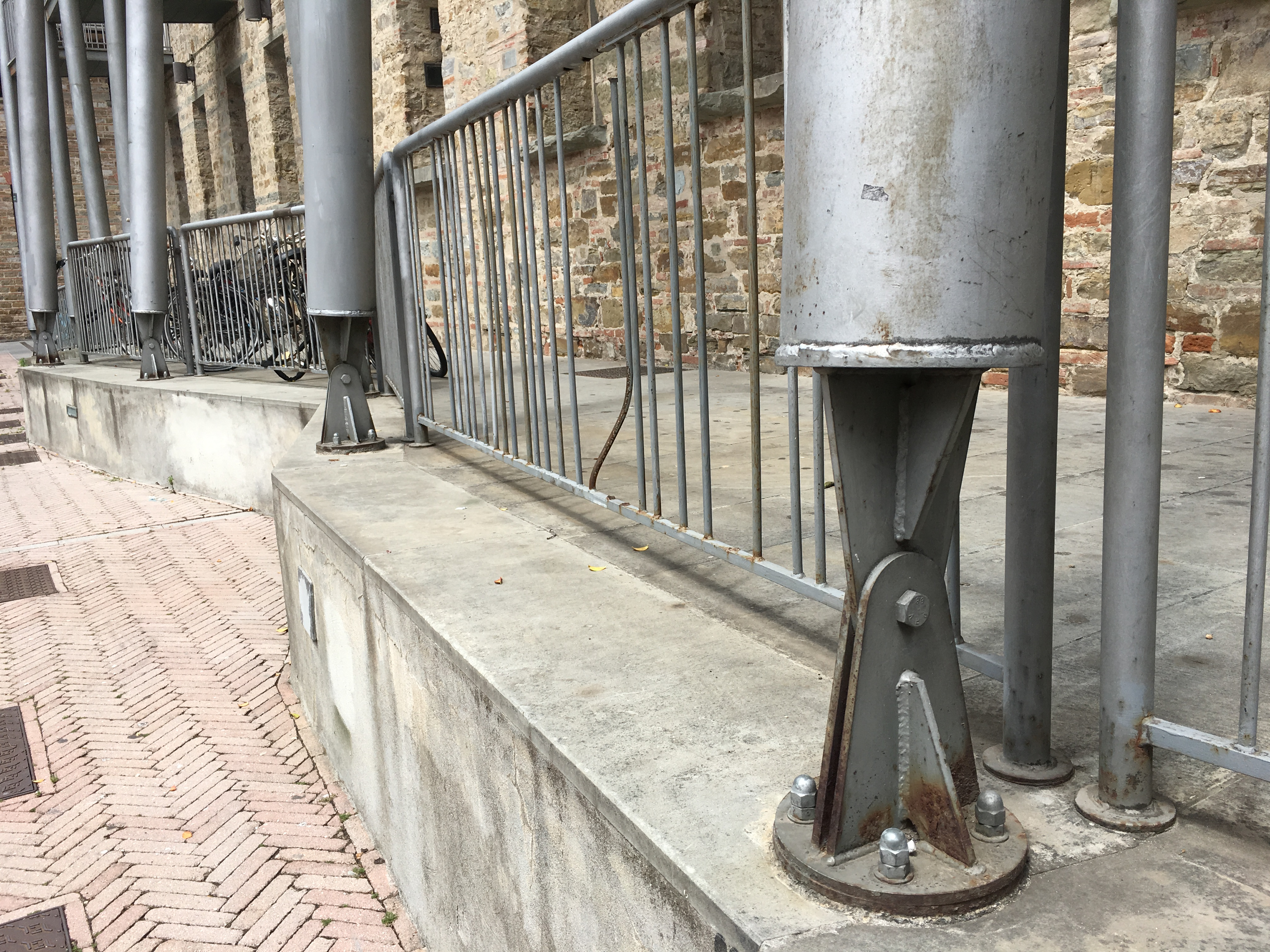 Le Murate Firenze. Particolare delle strutture in acciaio (pertiche) che sorreggono i balconi